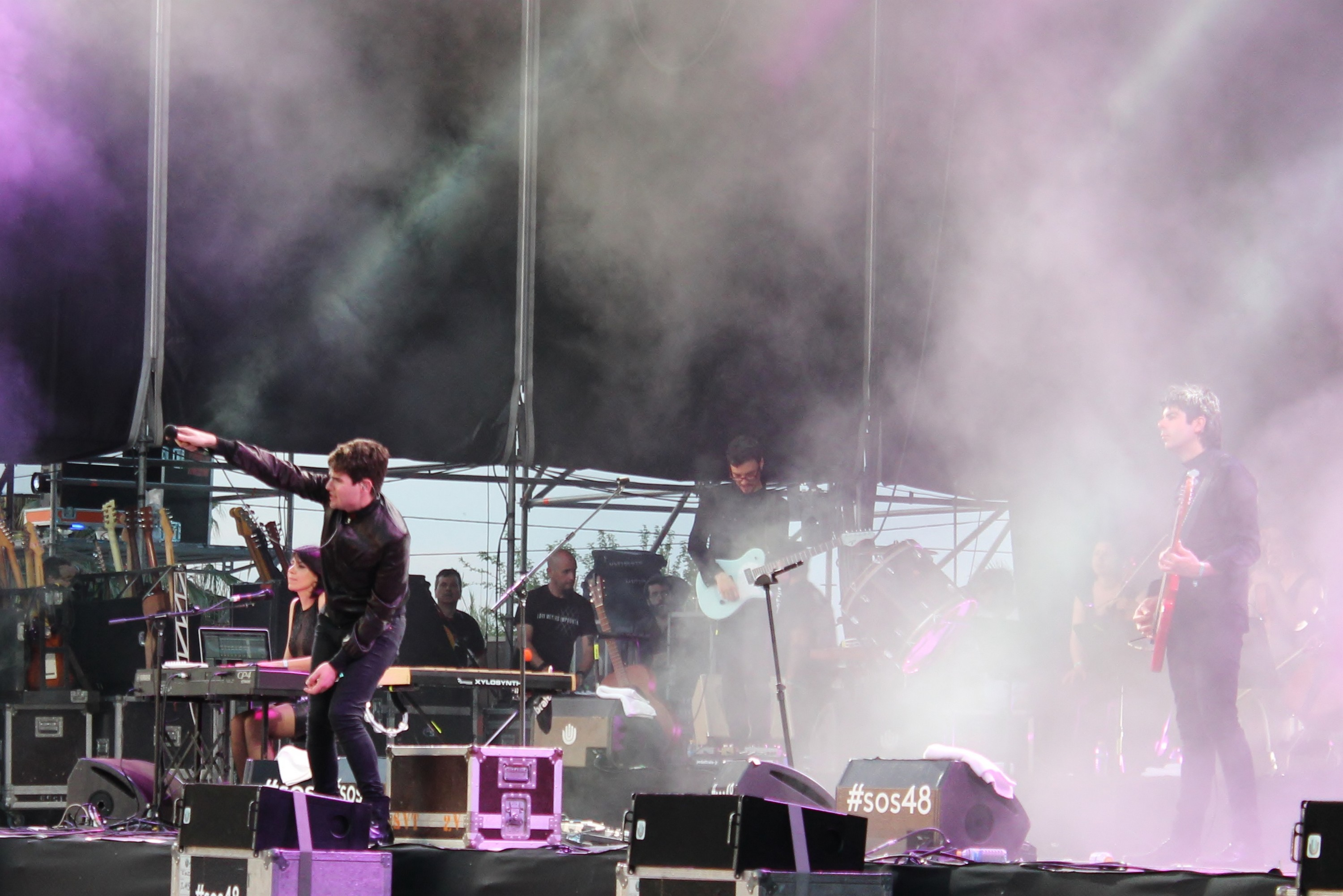 Dorian es una banda de indie pop originaria de Barcelona, en activo desde 2004. Concierto en el Festival SOS 4.8 2015, en Murcia.